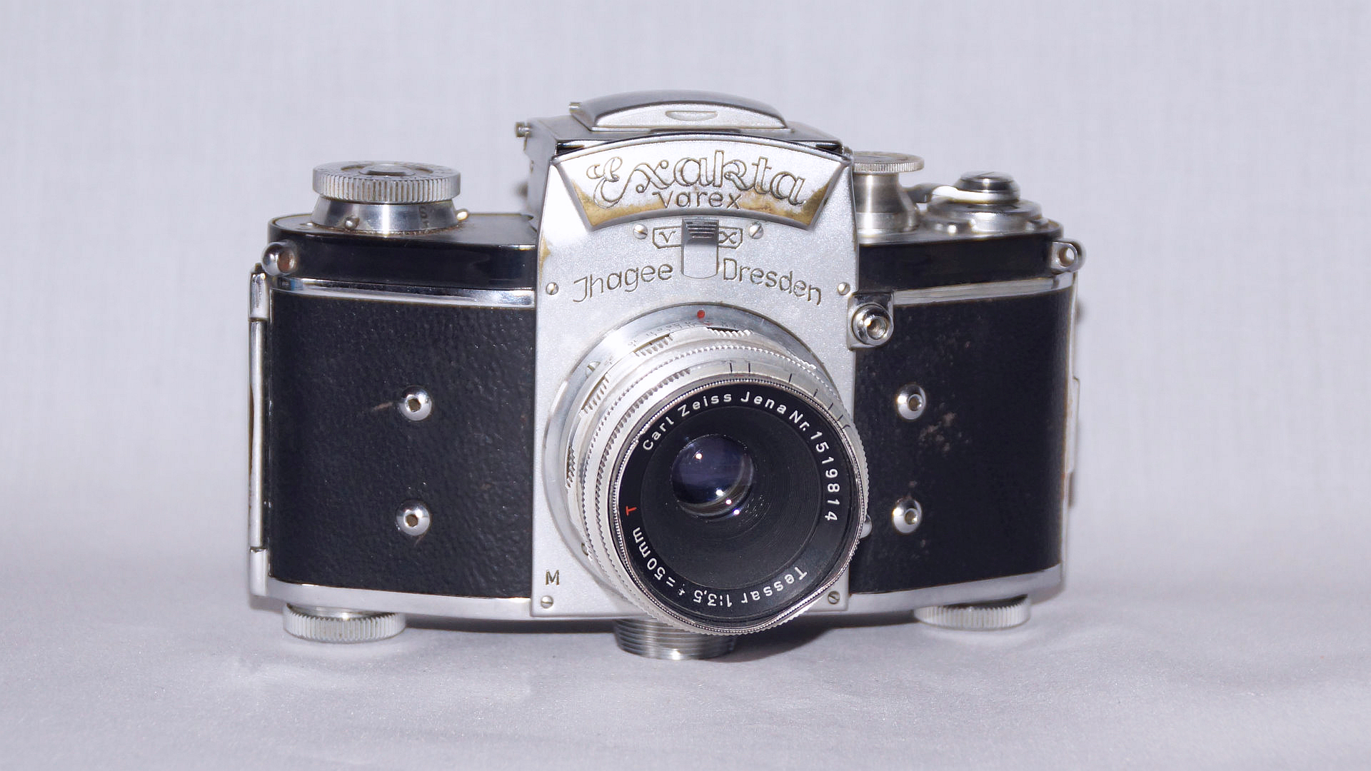 Exakta Varex mit Carl Zeiss Tessar 50mm, 1:3,5, von Ihagee Dresden - Foto 2019 Wolfgang Pehlemann DSC04852